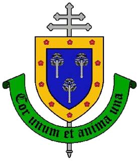 Escudo de la Arquidiócesis de Calabozo